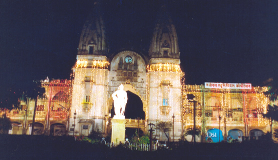 Khanderao Market